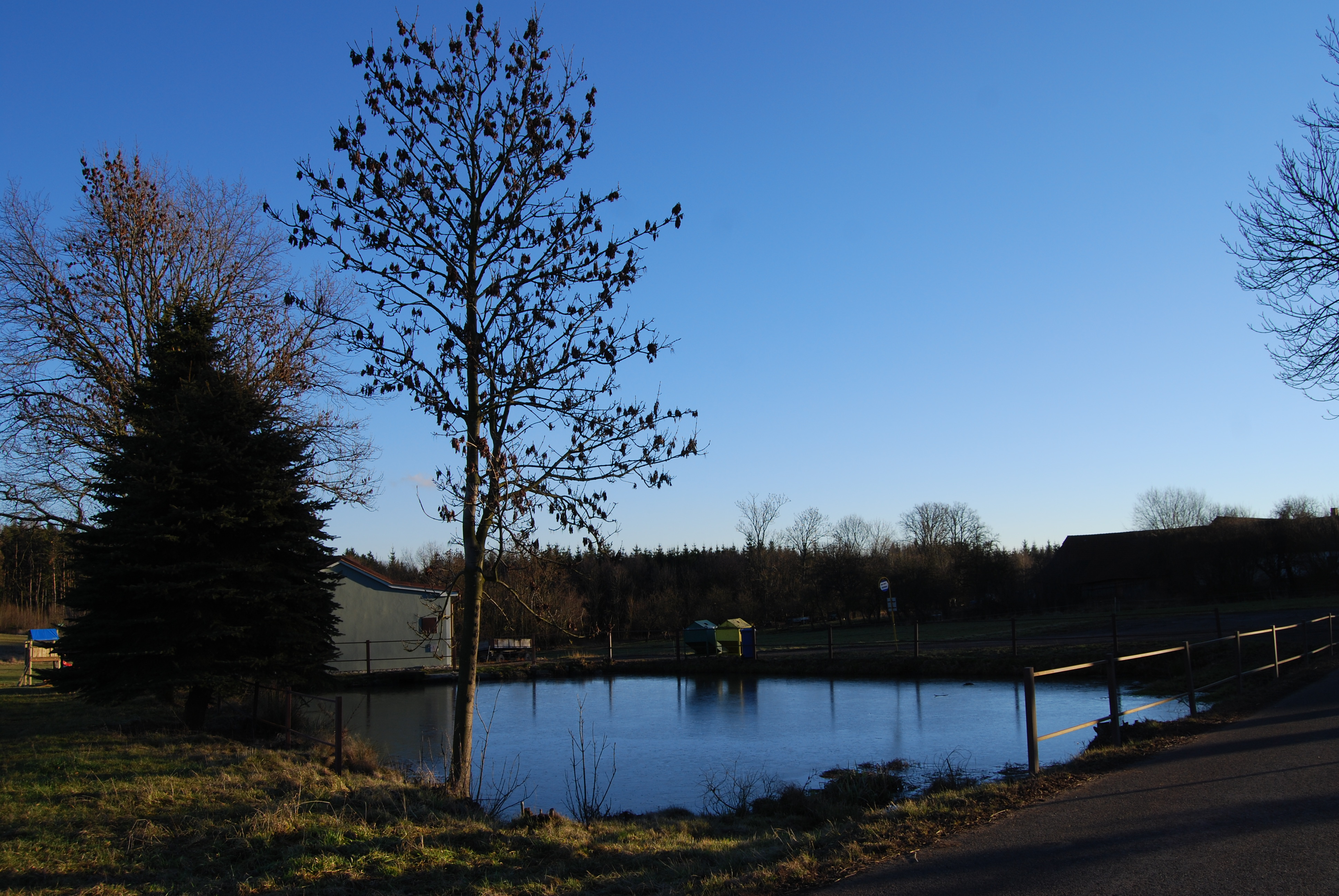 Bezejmenný rybník u komunikace ve směru od Borotína do obce. Nový Kostelec - část městyse Borotín v okrese Tábor. Čská republika. - Google Maps - Google Earth